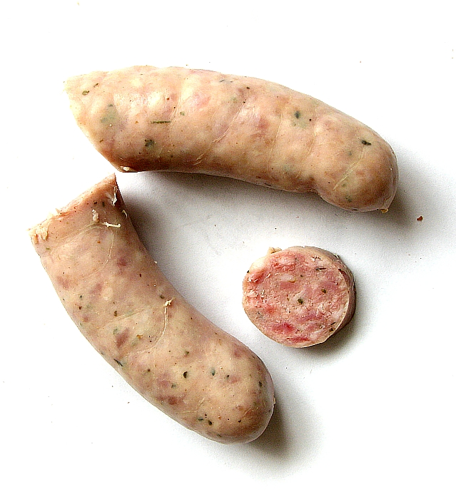 Sausage, kiełbasa biała